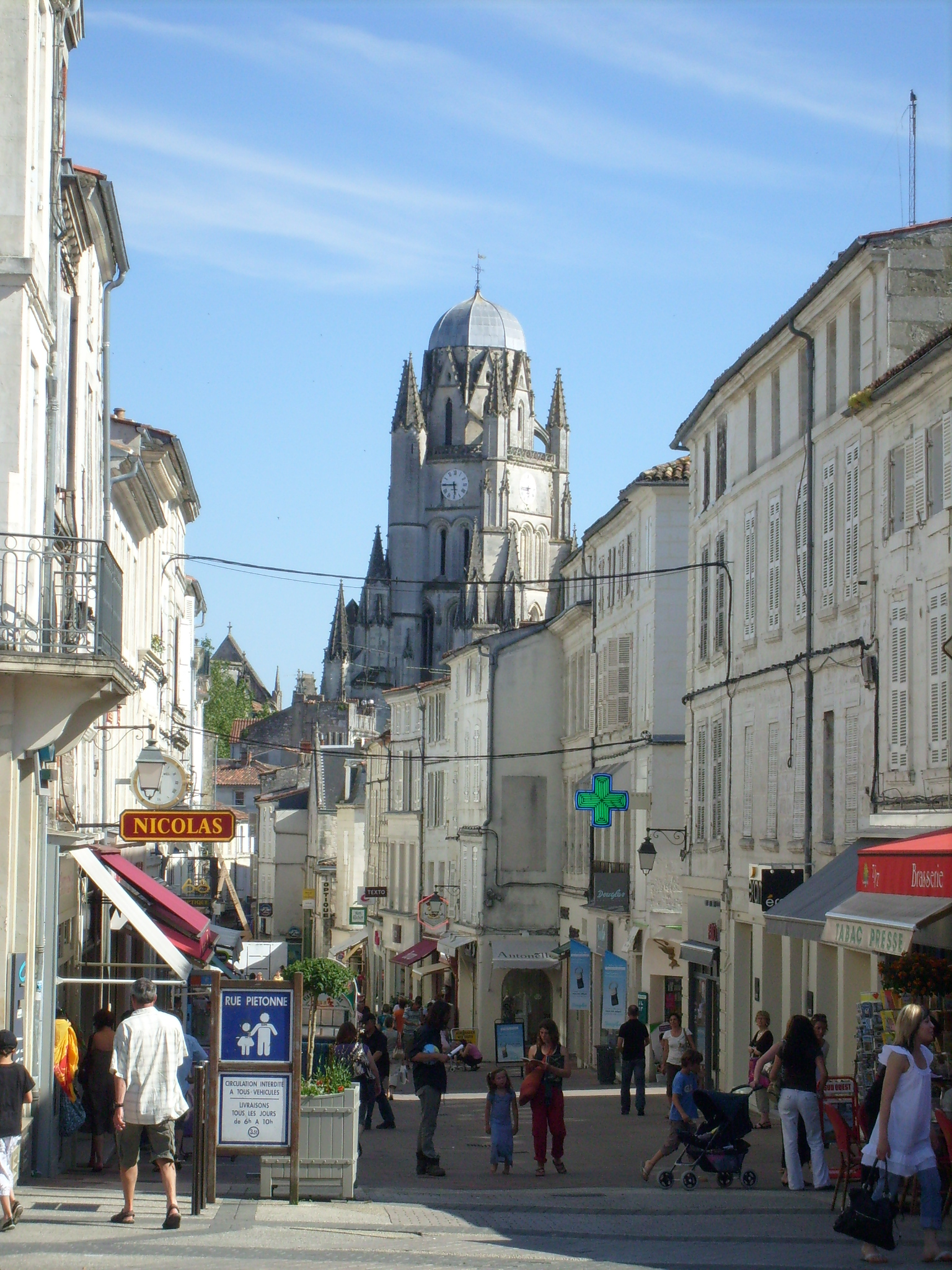 Rue Alsace Lorraine, centre historique de Saintes